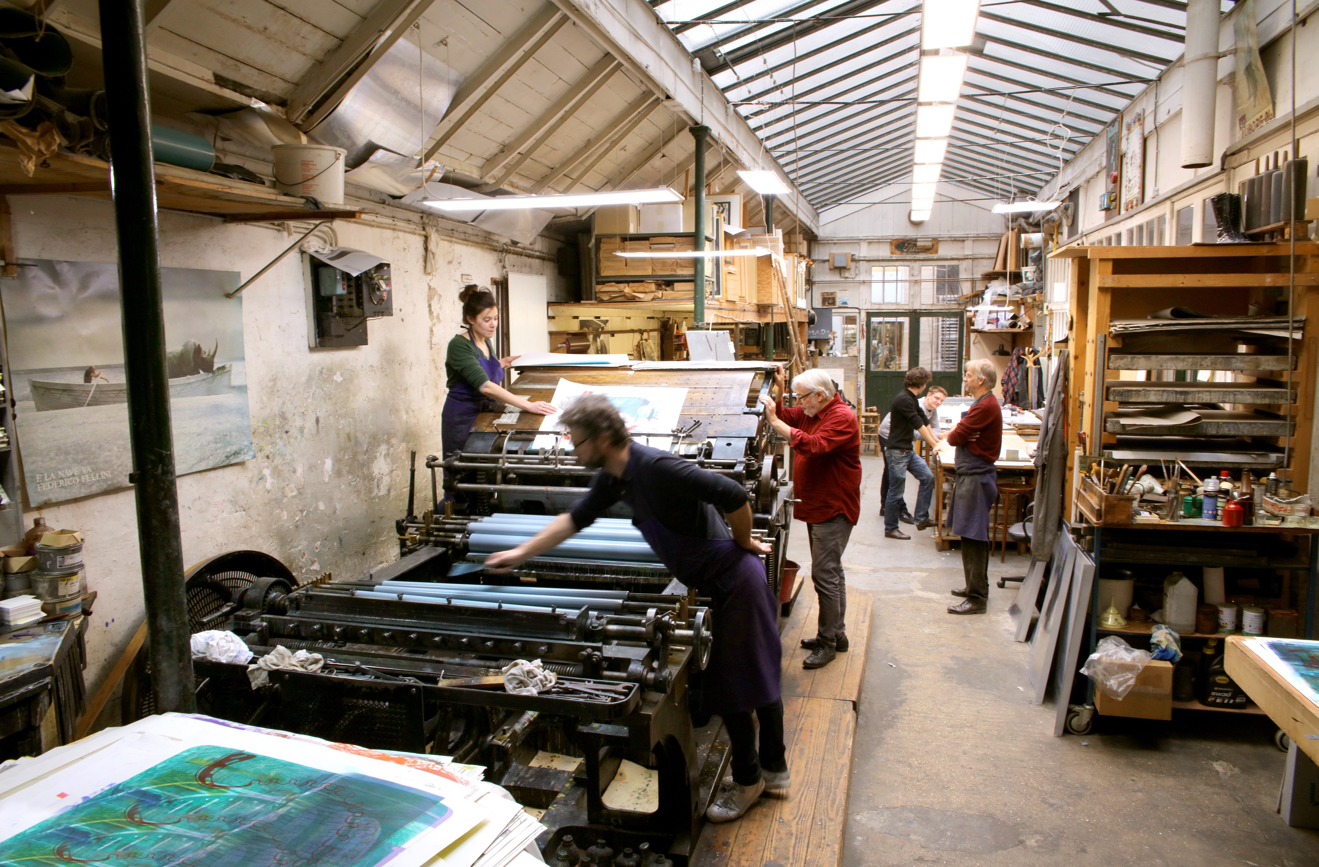 Intérieur de l'Atelier Clot, lithographe en impression d'une lithographie originale